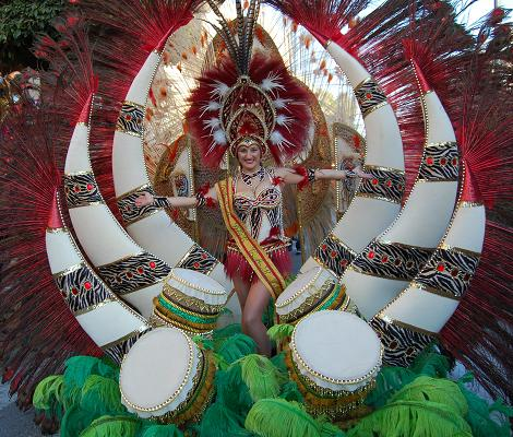 Reina 2008